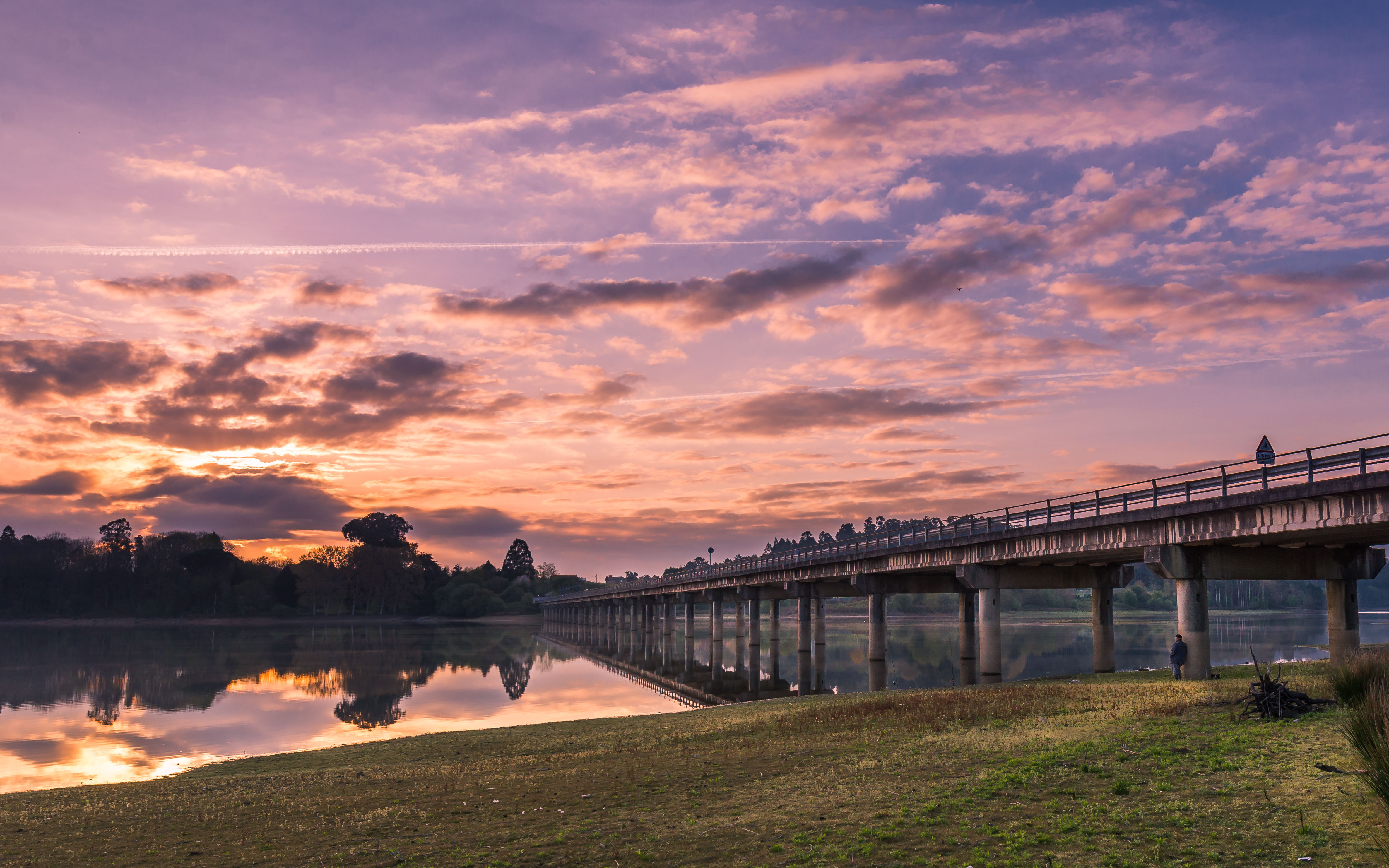 Encoro de Abegondo - Cecebre This is a photography of a Special Area of Conservation in Spain with the ID: ES1110004. Natura2000 entry, EEA entry